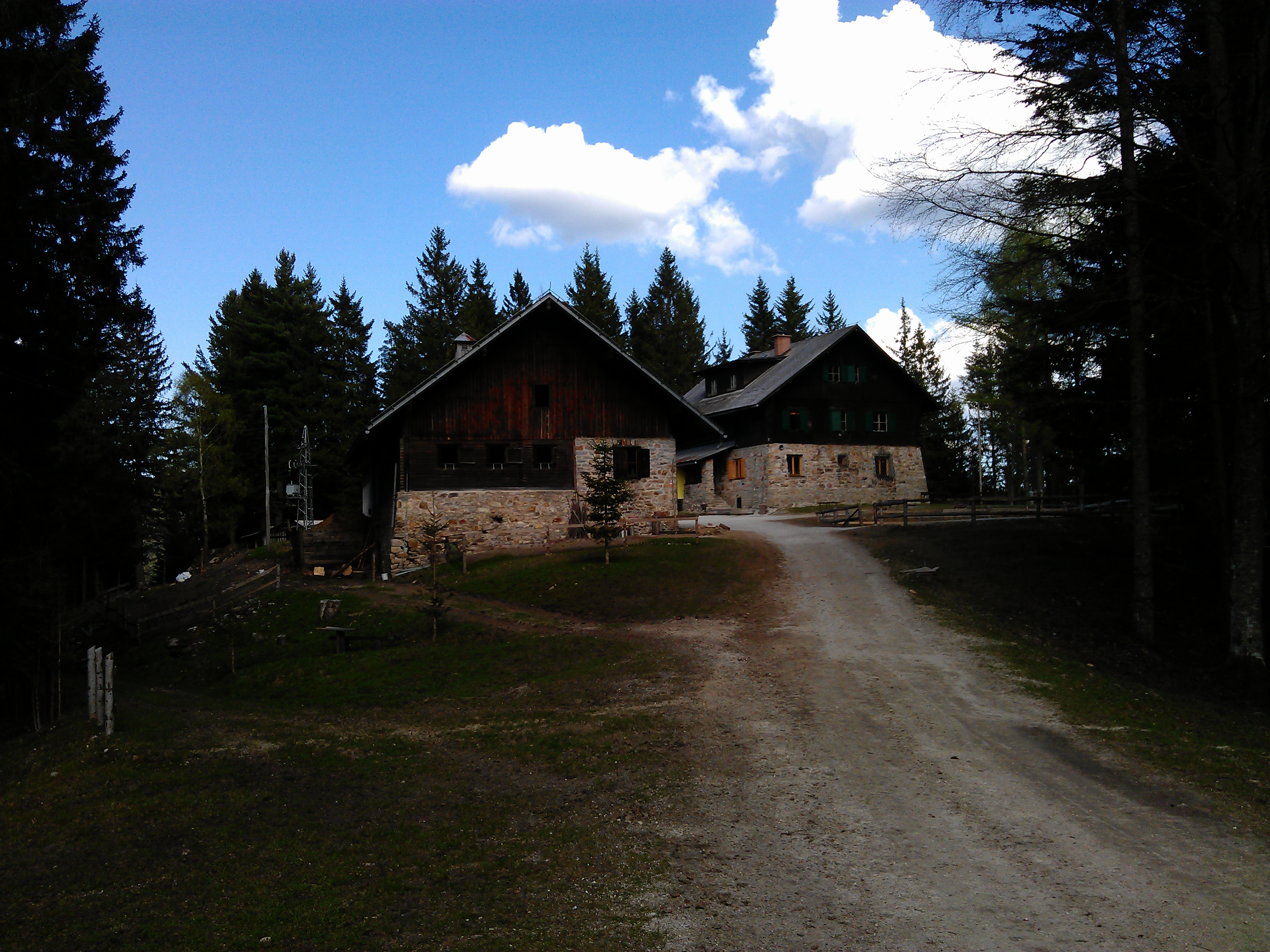 Dom na Sumiku